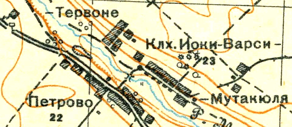 Топографическая карта Ленинградской области, квадрат О-35-24-Б-б (Колхоз Туганицы), деревни Петрово и Мута-Кюля